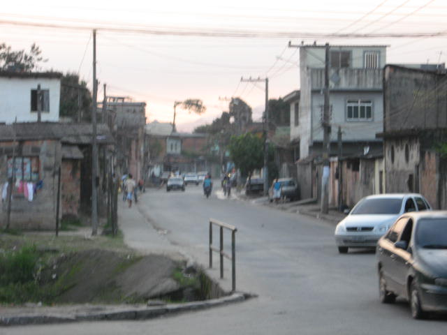 Areia Branca, bairro de Belford Roxo, no estado do Rio de Janeiro